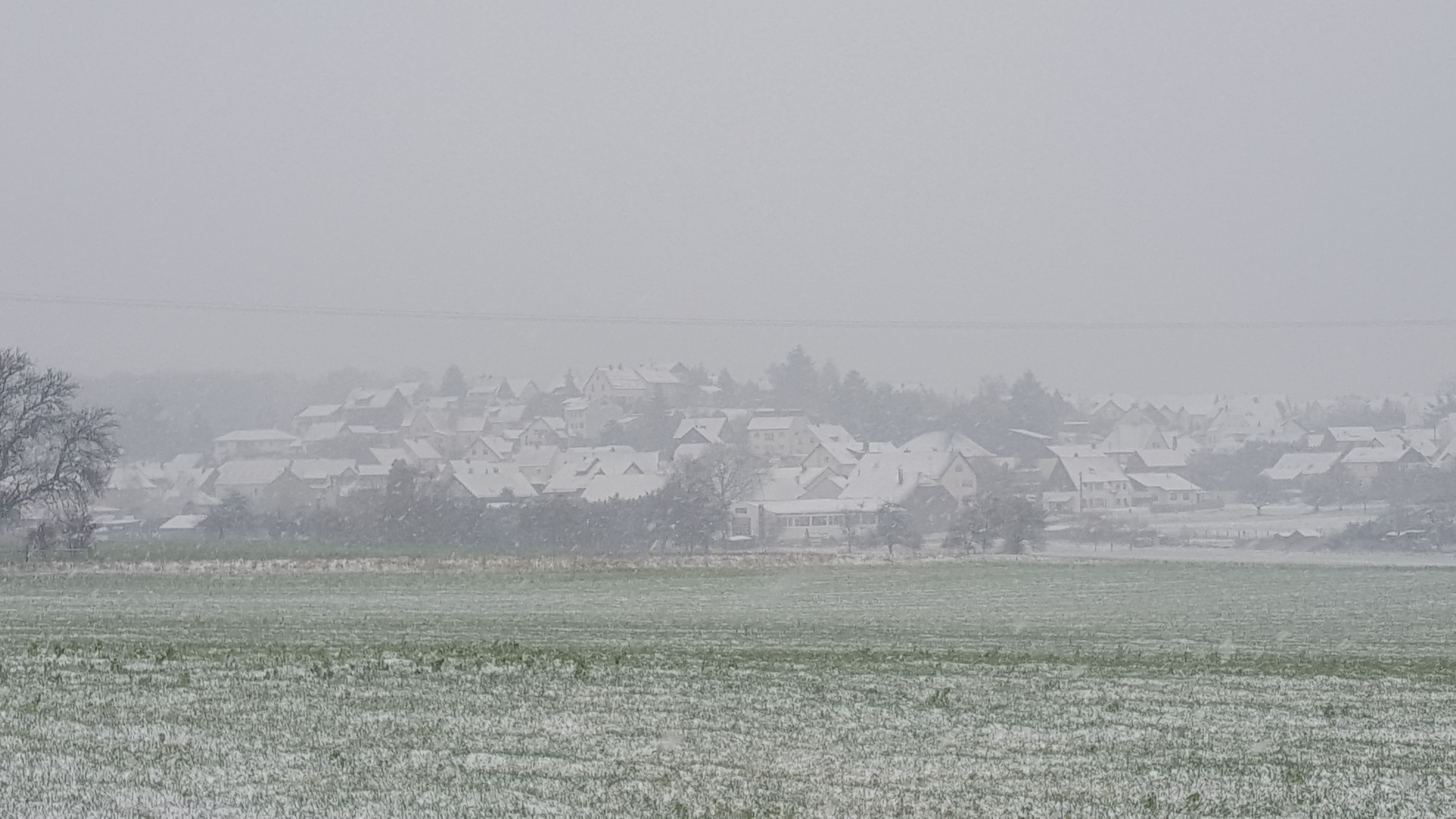 Norden Miesenbach